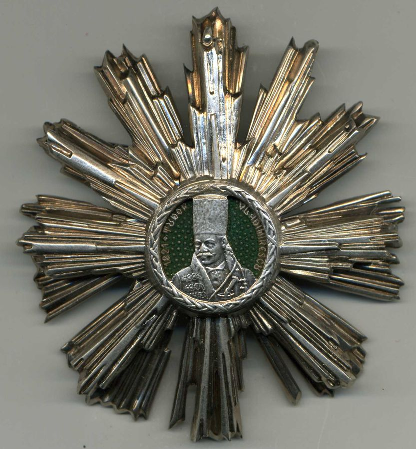 Орден Тудора Владимиреску 3 степени